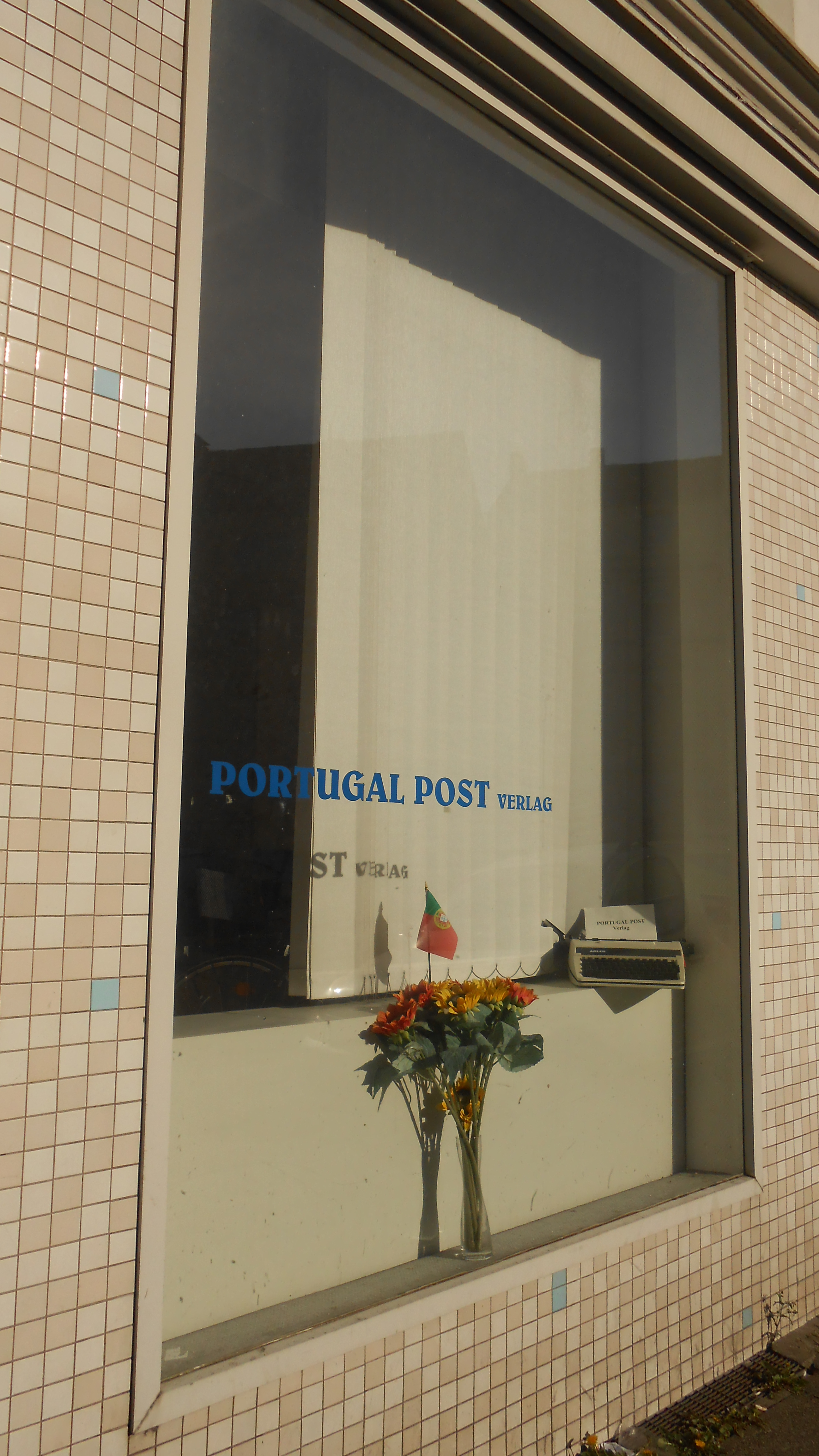 Sitz des Portugal Post-Verlags in der Burgholzstr.43 in Dortmund.